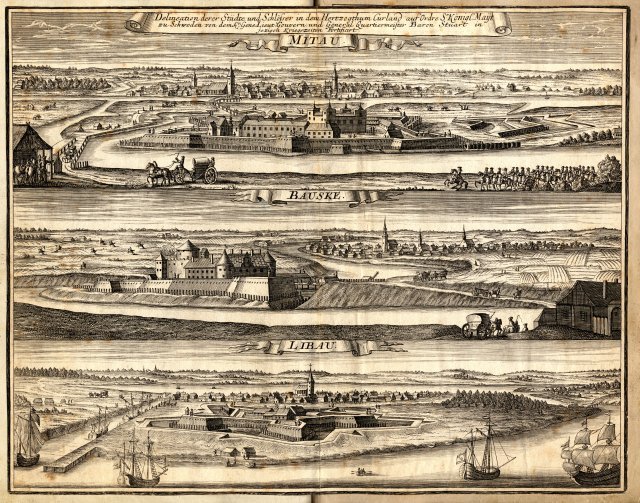 Scan from Johann Christoph Brotze's book Sammlung verschiedner Liefländischer Monumente. Delineation derer Städte und Schlösser in dem Hertzogthum Curland ... [Mitau; Bauske; Libau; die Gravüre].